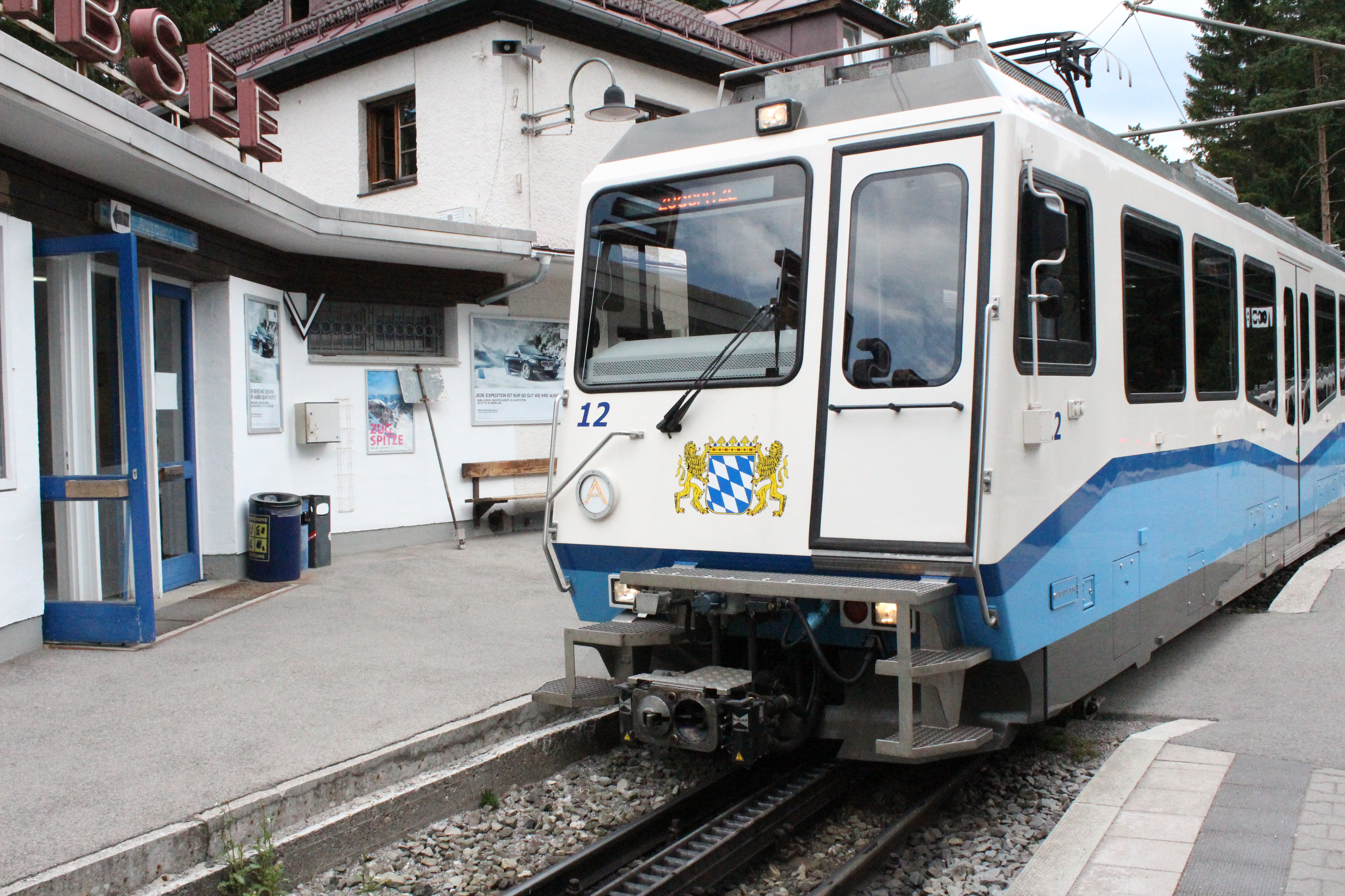 Die Zugspitzbahn beim Einfahren in die Haltestelle Eibsee unterhalb der Zugspitze.